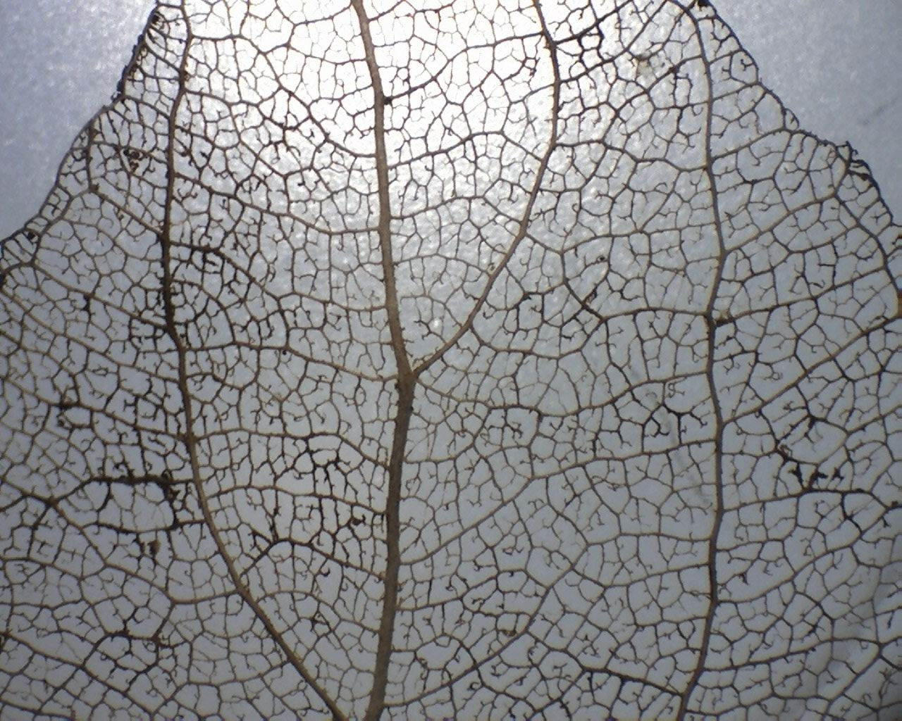 Blattskelett